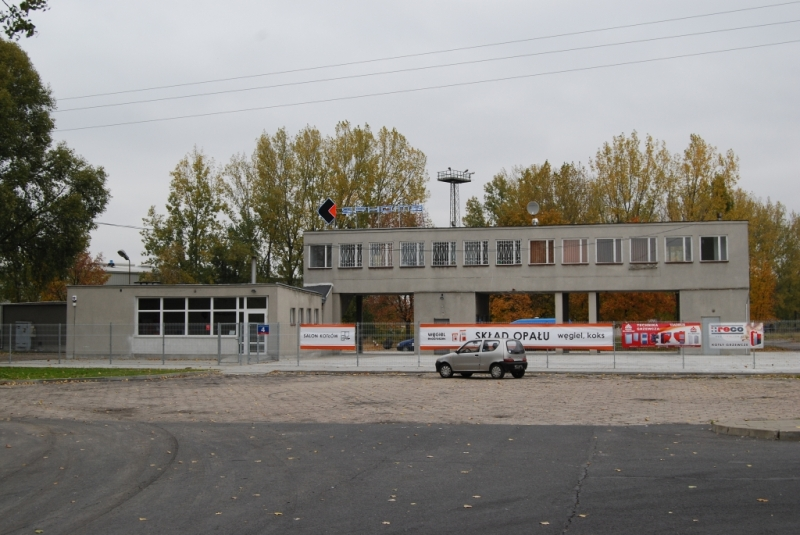 Sphoimb